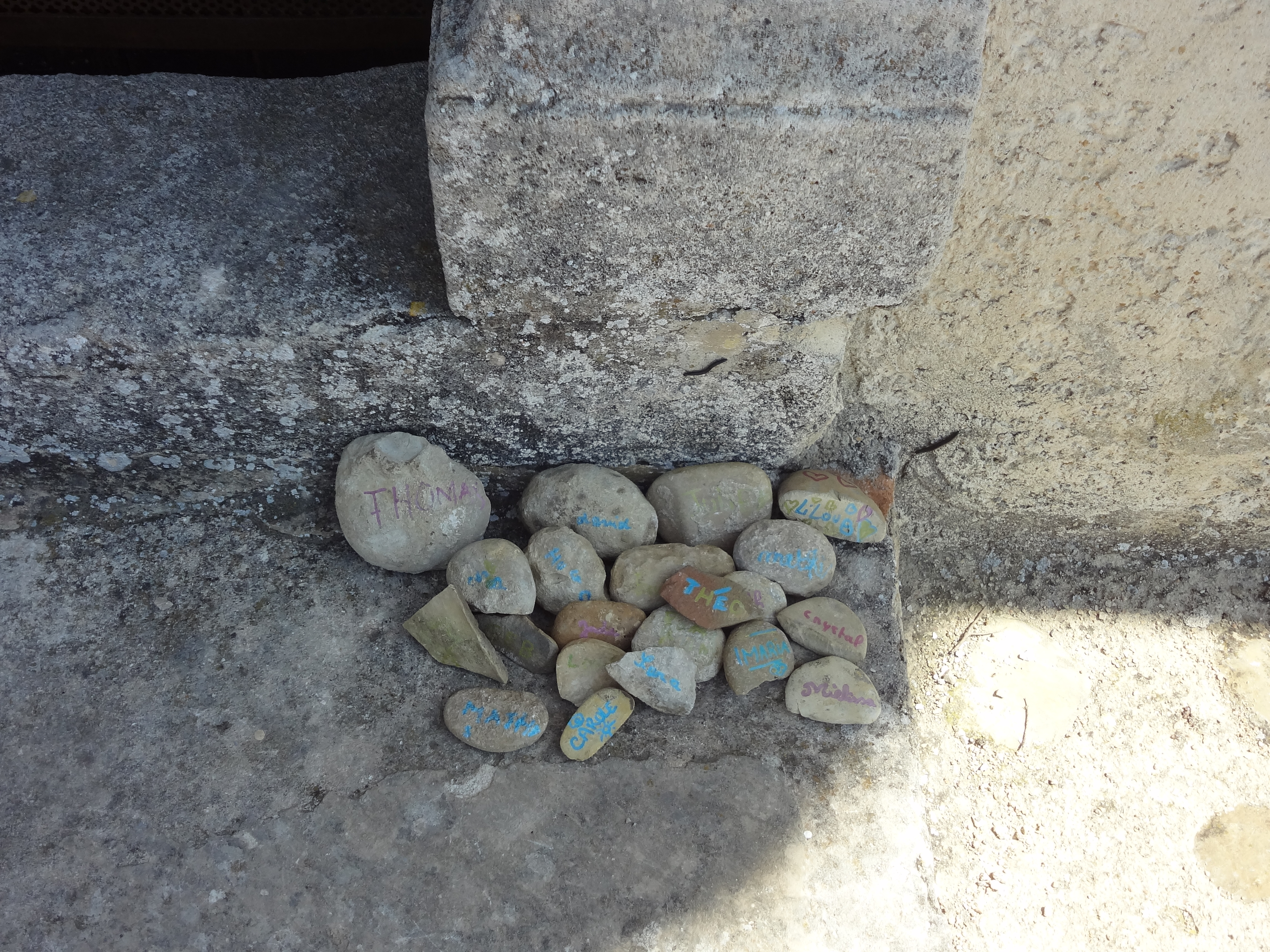 ex-voto : des galets et morceaux de cailloux portent le prénom de la personne aimée